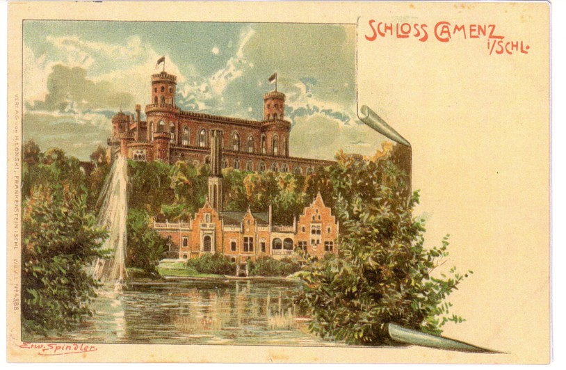 Titel: SCHLOSS CAMENZ i./SCHL.; Kartennummer: 4388; Signatur: Erw.Spindler; Signaturlage: links untenr Bild; Gedruckt bei: Adolf Heinzelmann, Camenz i. Schl.